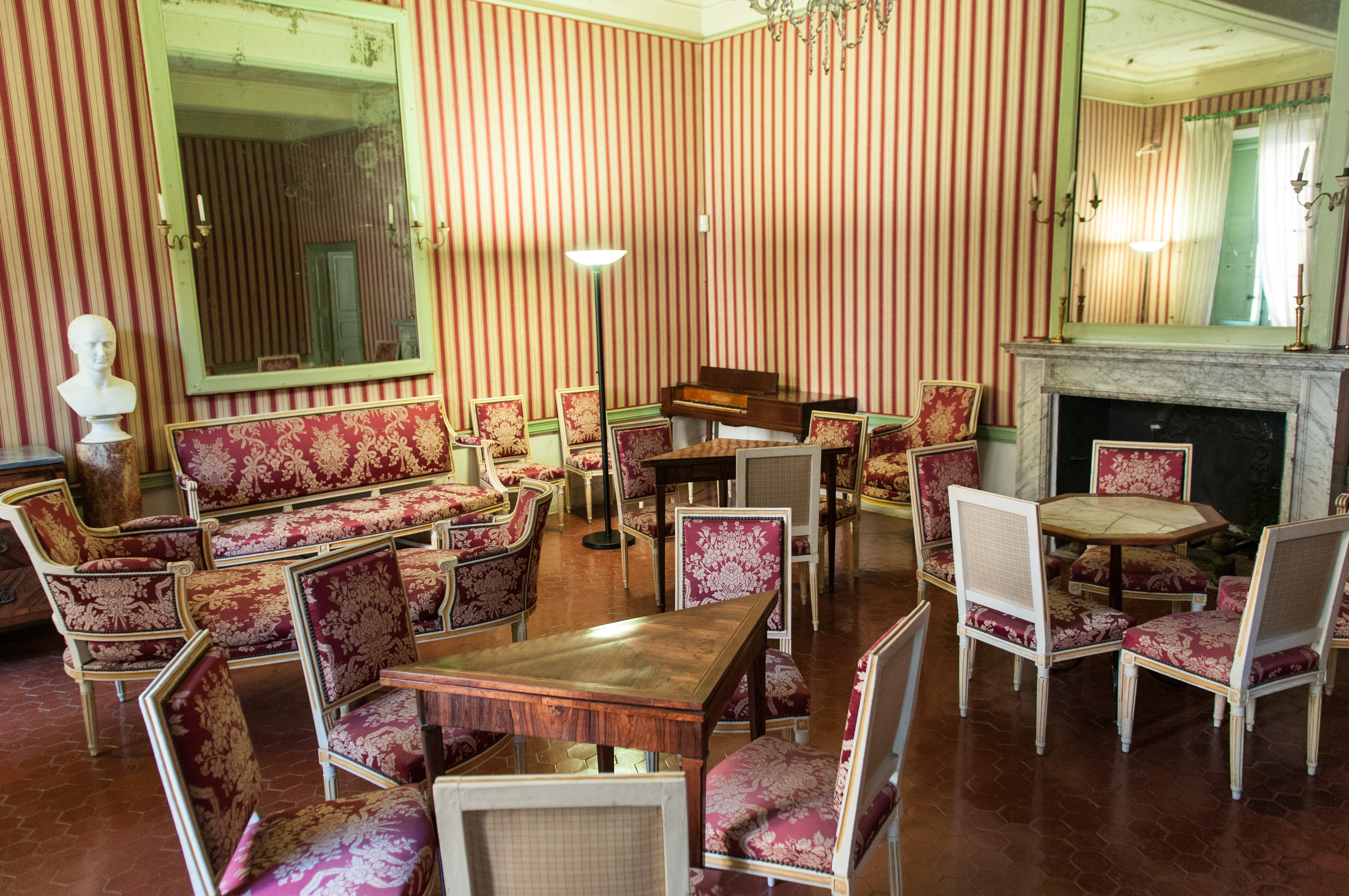 Inside of Musée de la Maison Bonaparte à Ajaccio